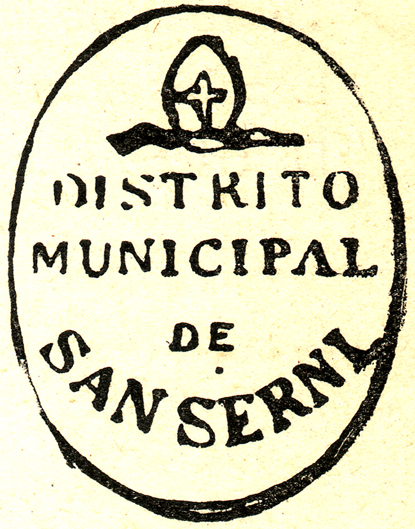 Escut municipal de Sant Serni (Gavet de la Conca, Pallars Jussà)